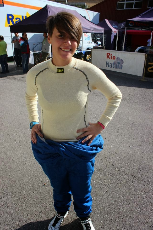 Raquel Ruiz- Copiloto